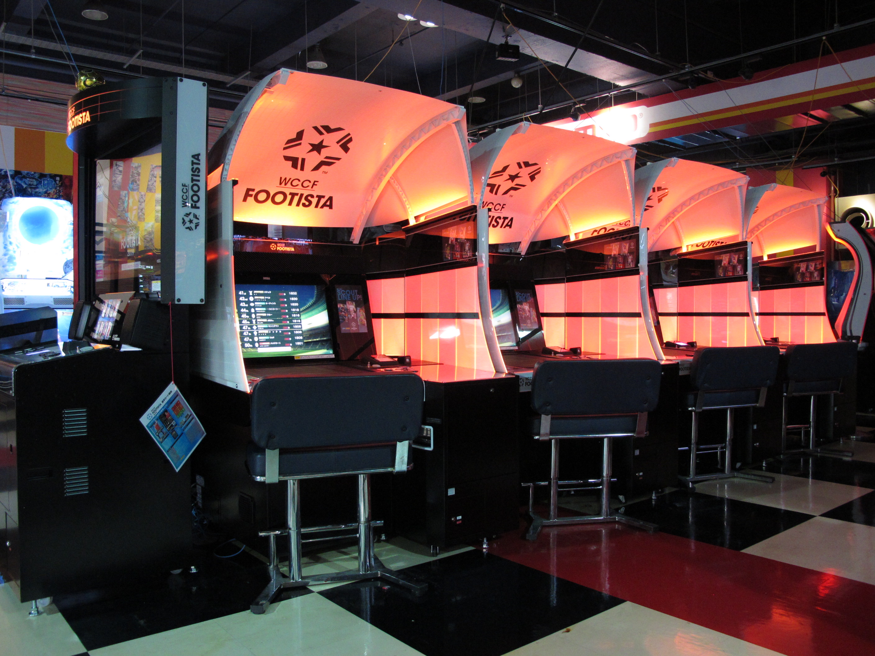 セガのアーケードゲーム、WCCF（WORLD CLUB Champion Football）FOOTISTAの筐体